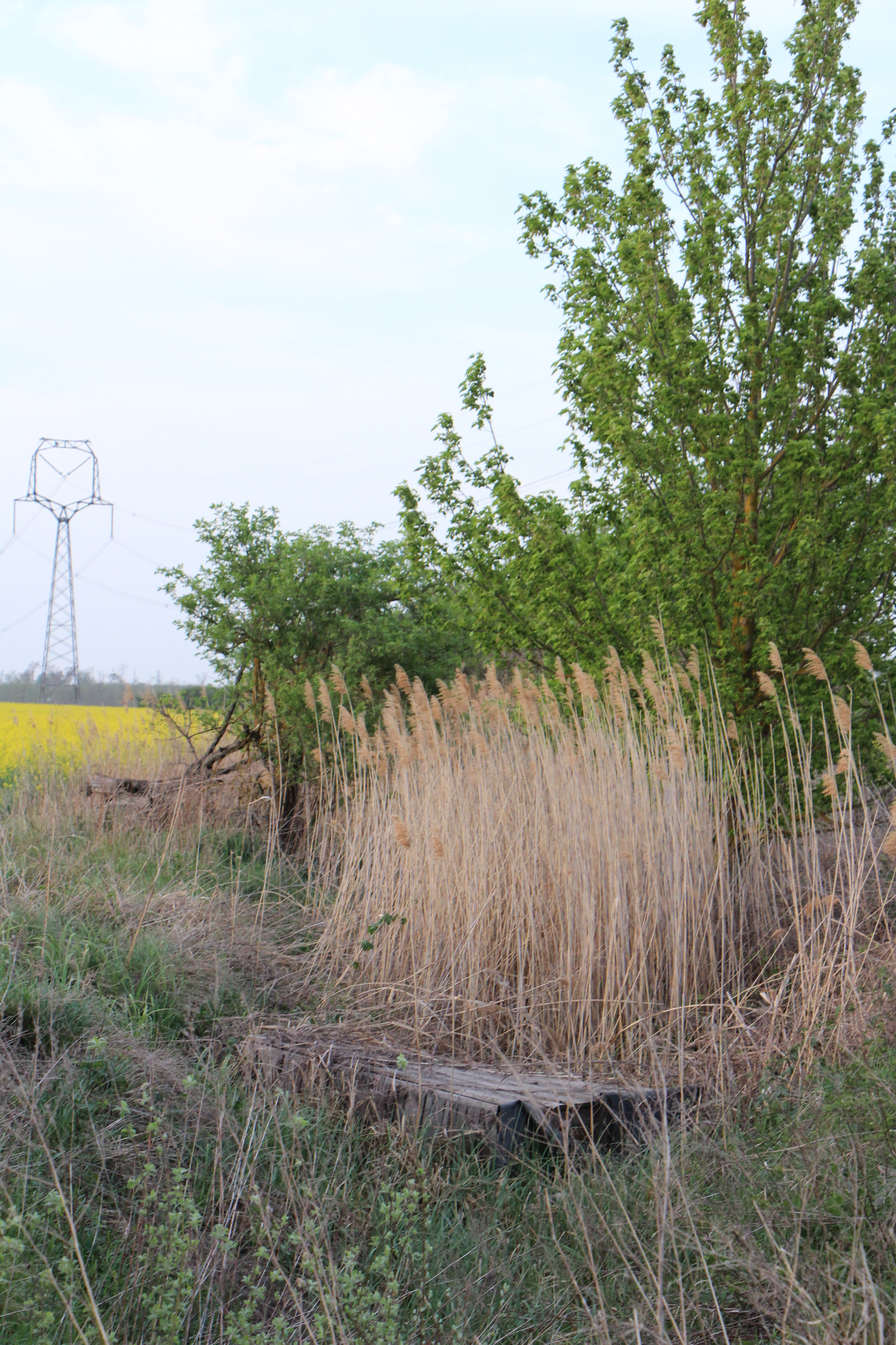 Koryto kanála